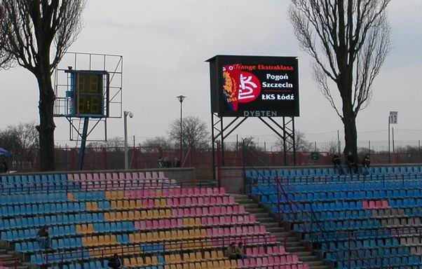 Stadion Miejski w Szczecinie. Stara i nowa tablica wyników.